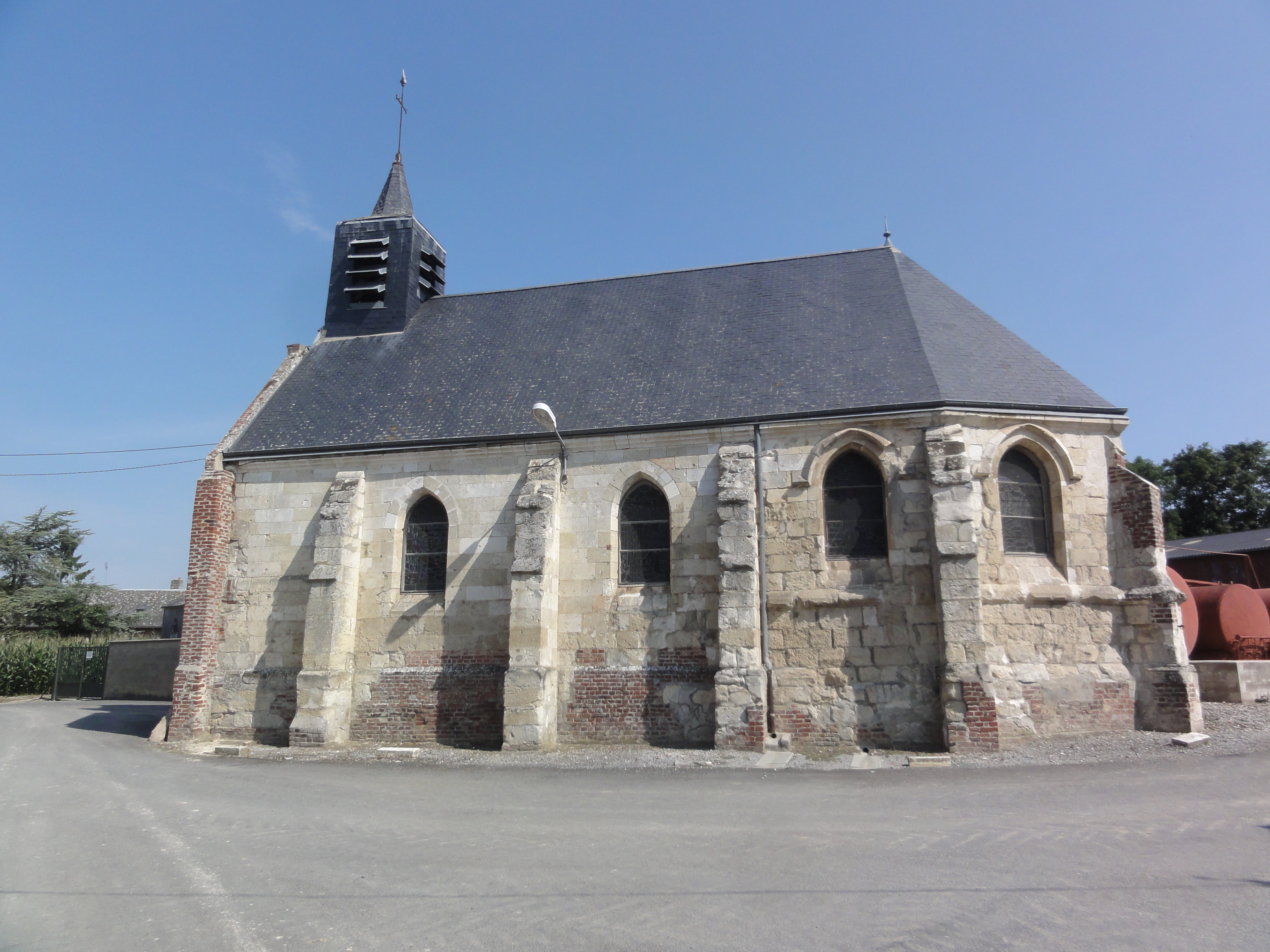 Magny-la-Fosse (Aisne) église